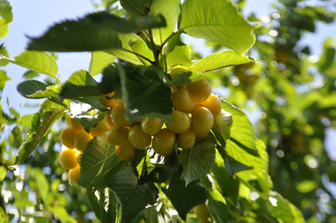 Кизлярский район, Дагестан